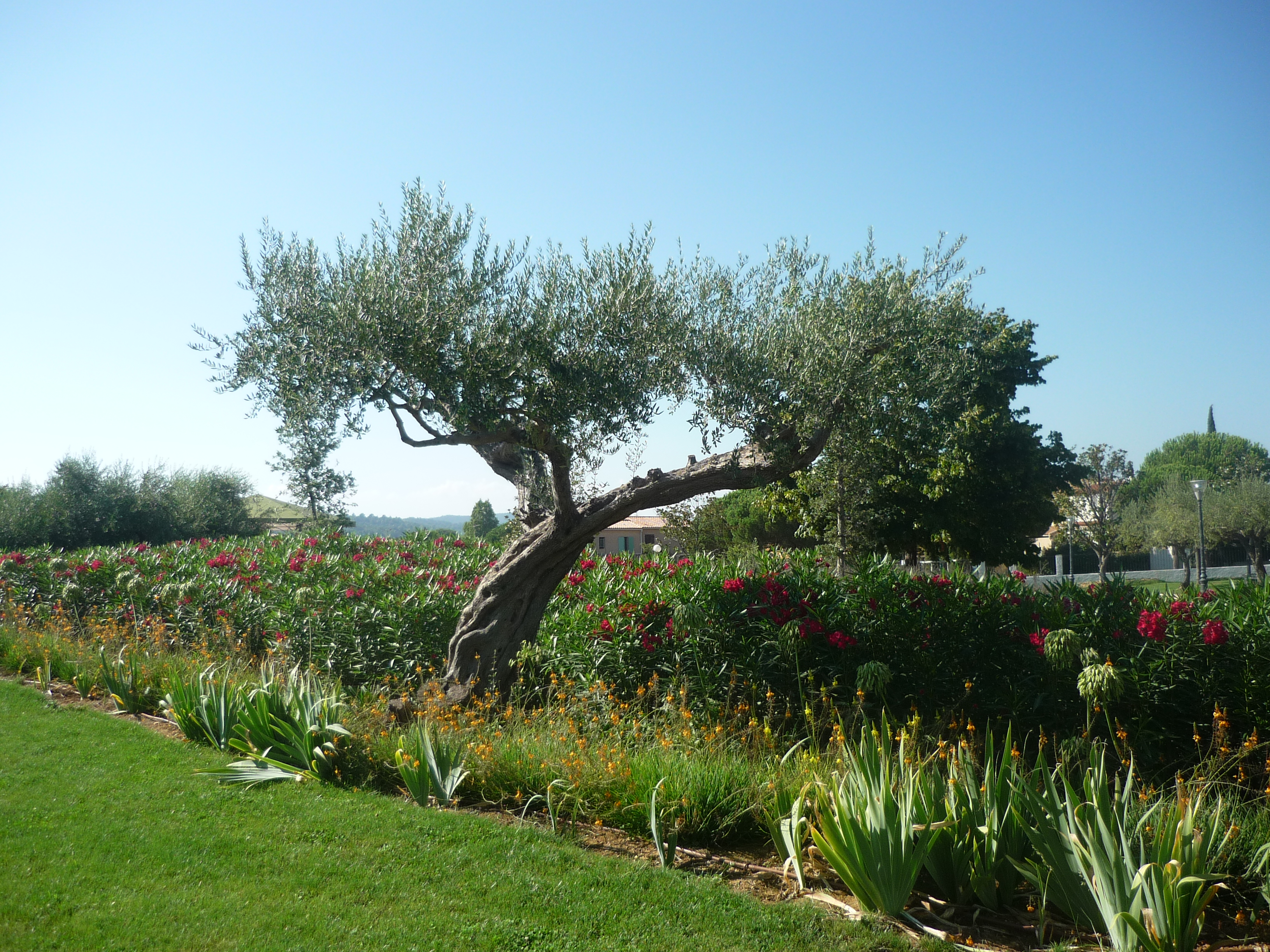 Vue du "Jardin des oliviers" à La Londe-les-Maures sur la Côte d'Azur.